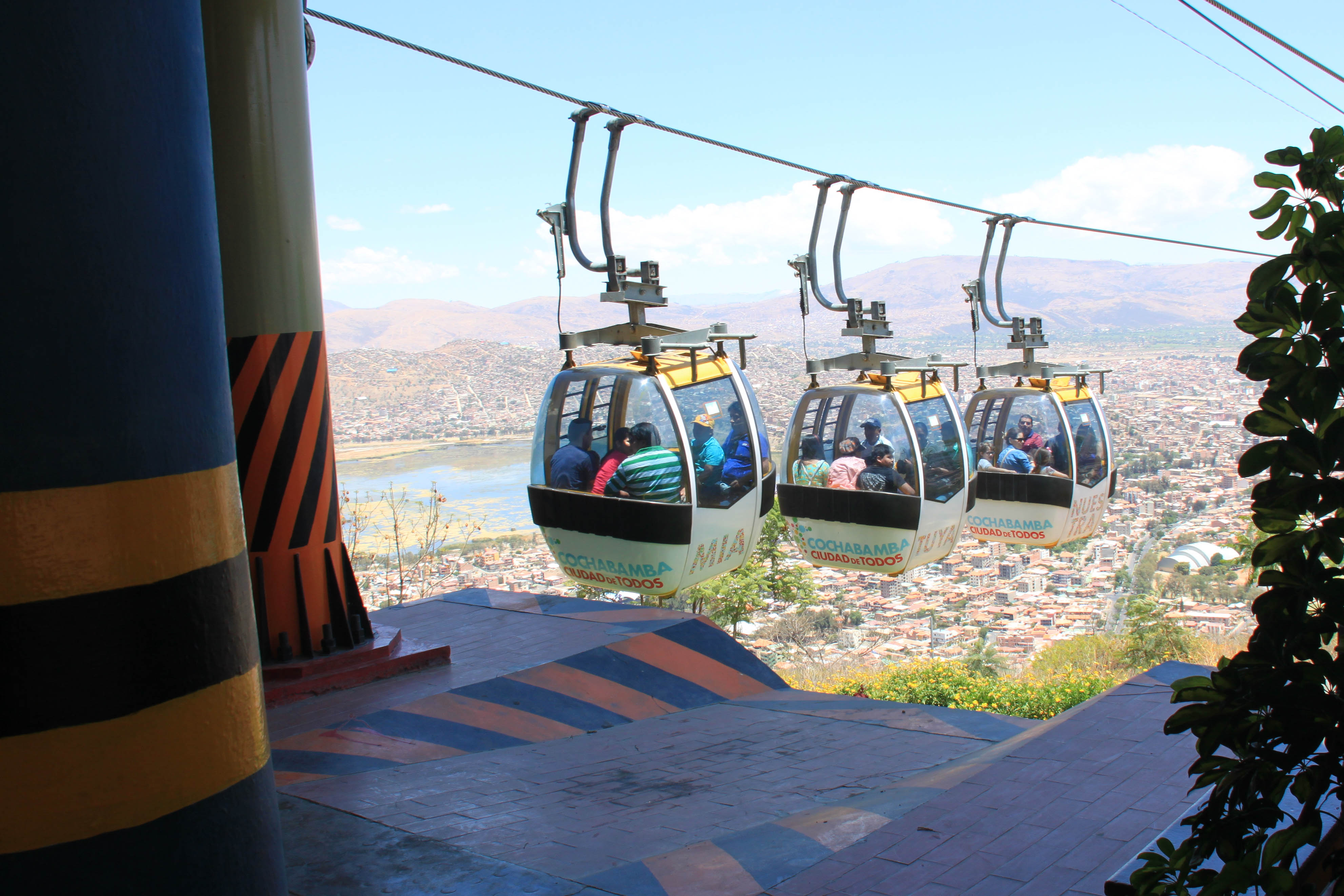 Mit dieser Seilbahn kann man zum Christo de la Concordia fahren.